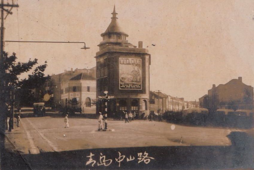 青岛大窑沟旧影